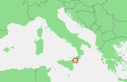 In dutch: Locatie Straat van Messina.PNG